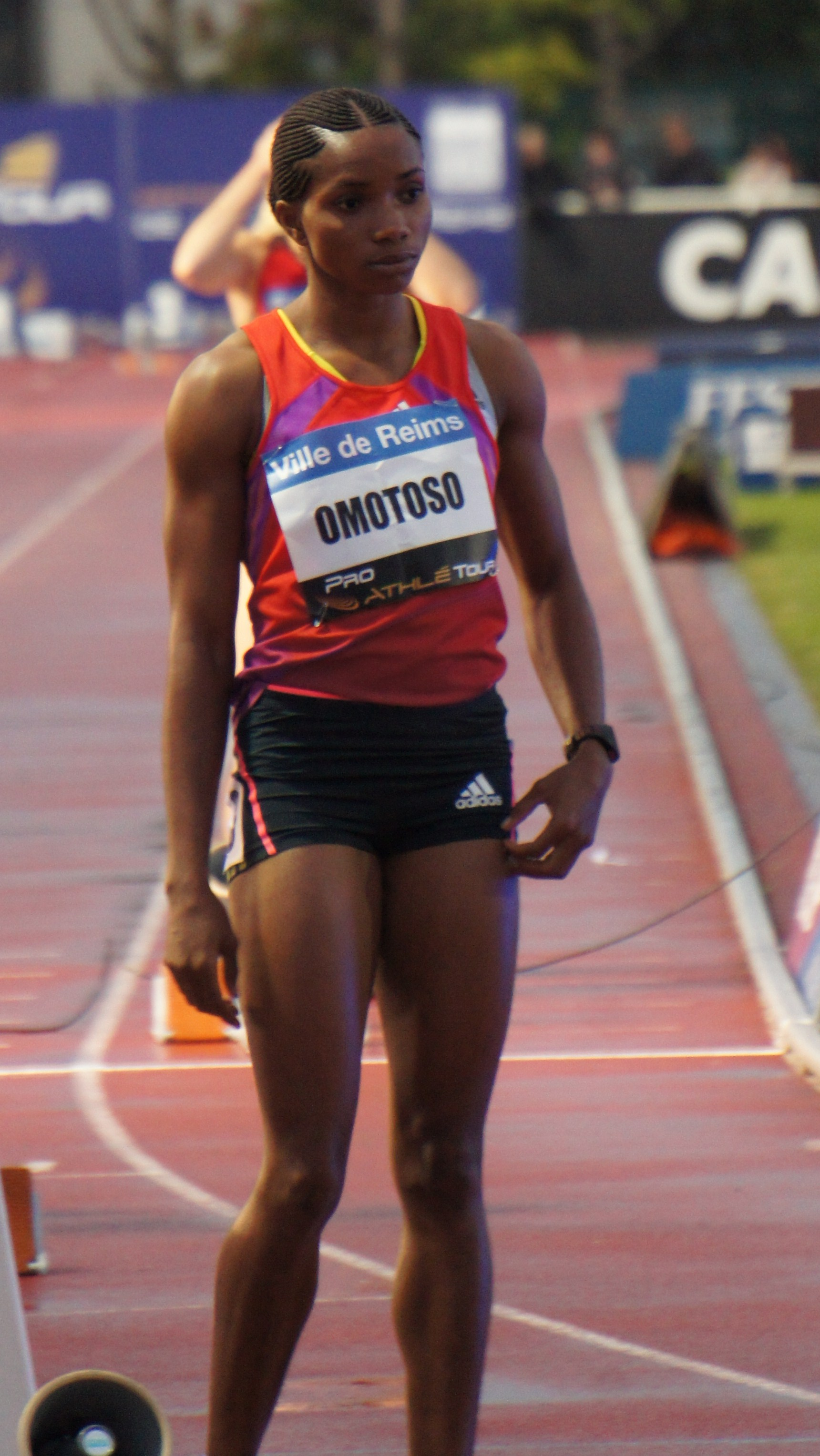 Omolara Omotoso lors des Rencontres d'athlétisme de Reims 2013 .